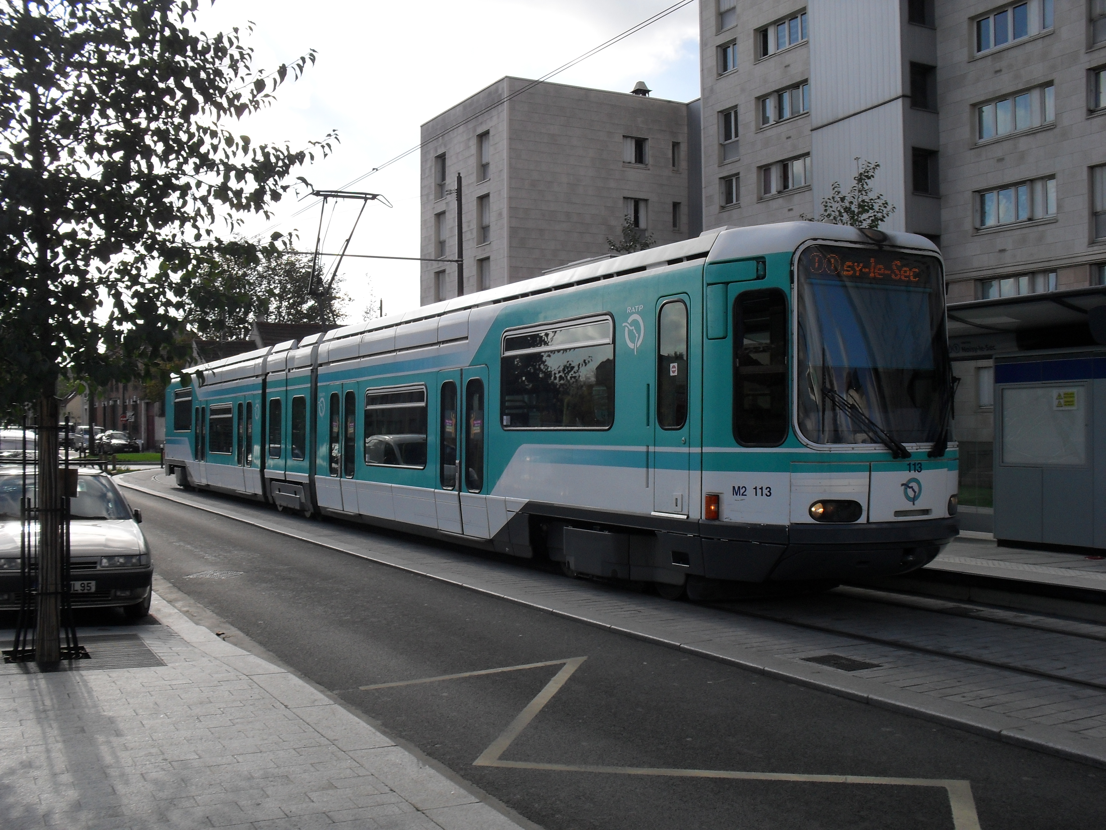 Paris Tramway ligne 1